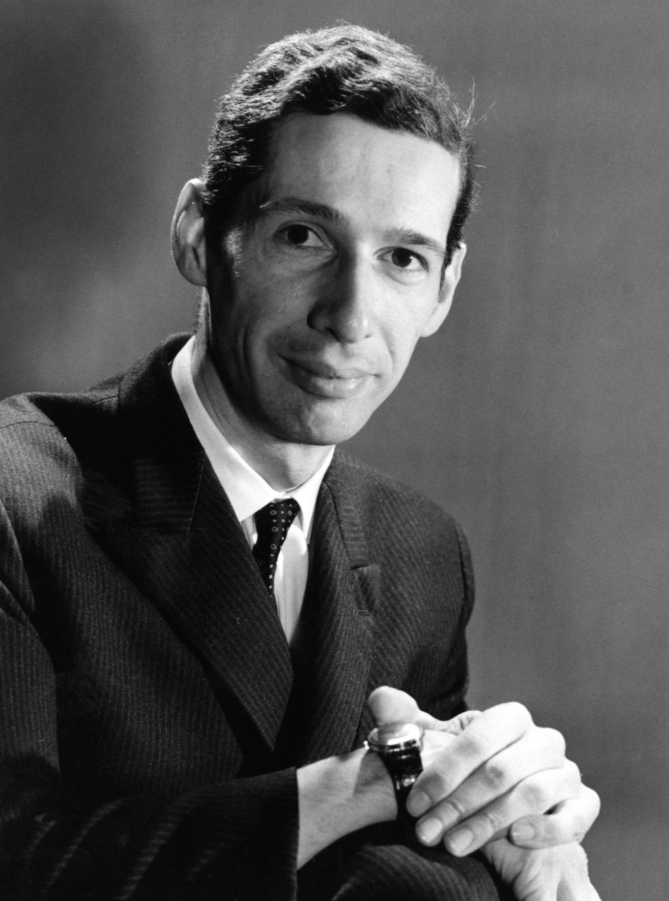 Portrait photographique de Jean-Pierre Wallot